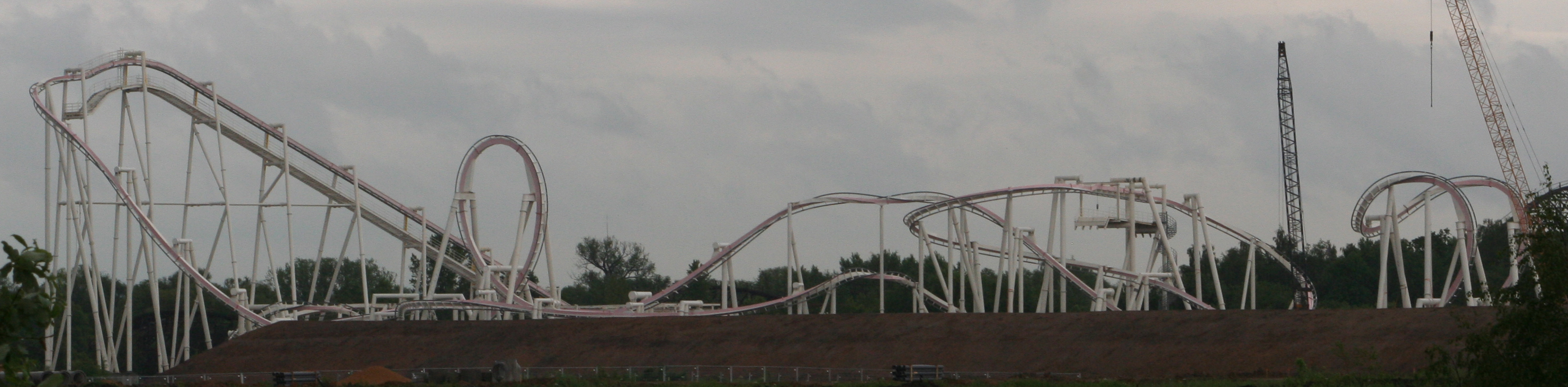 Panorama de l'inverted coaster The Monster, merci a Dad57c